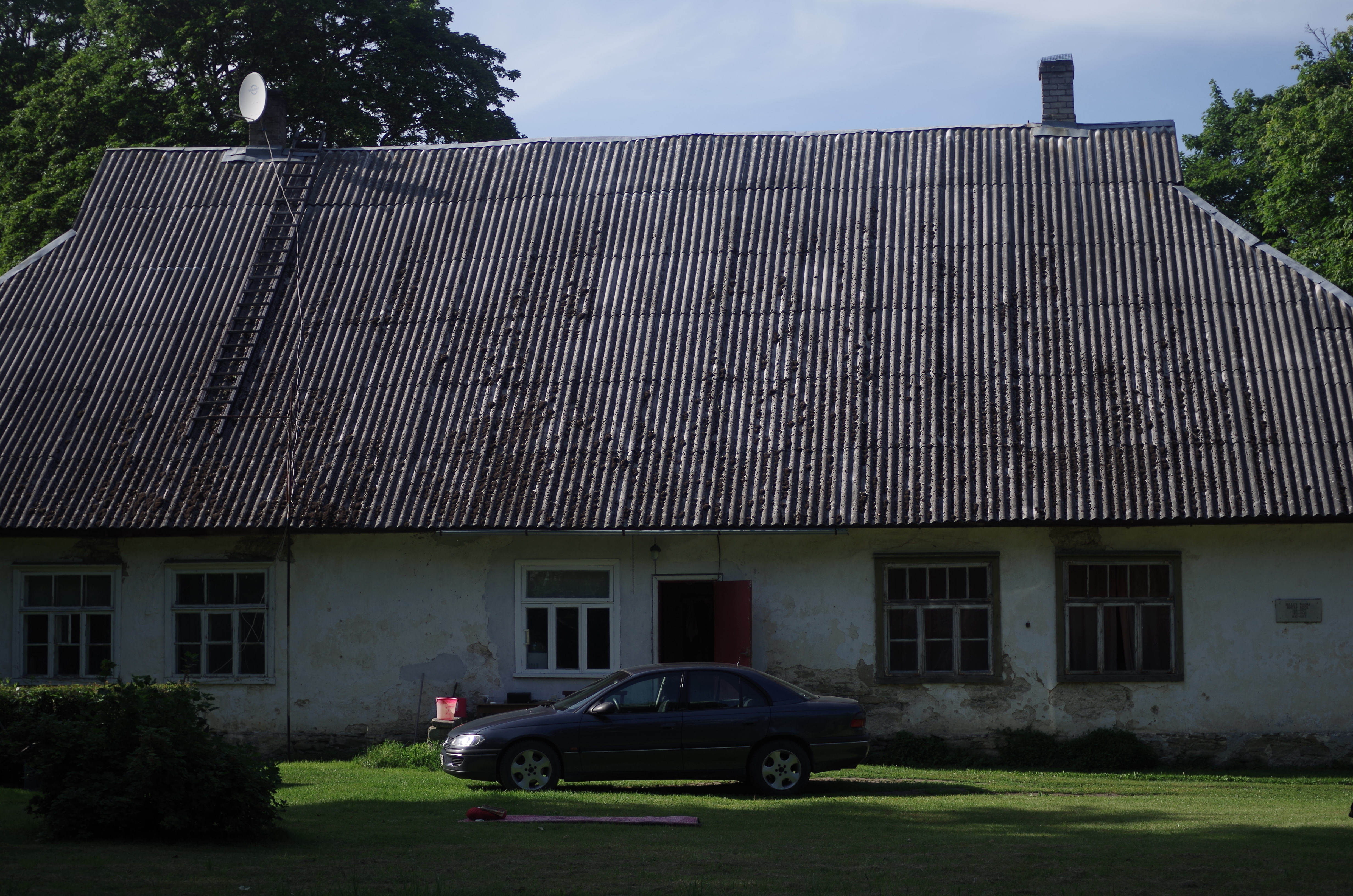 Ilpla mõisa peahoone